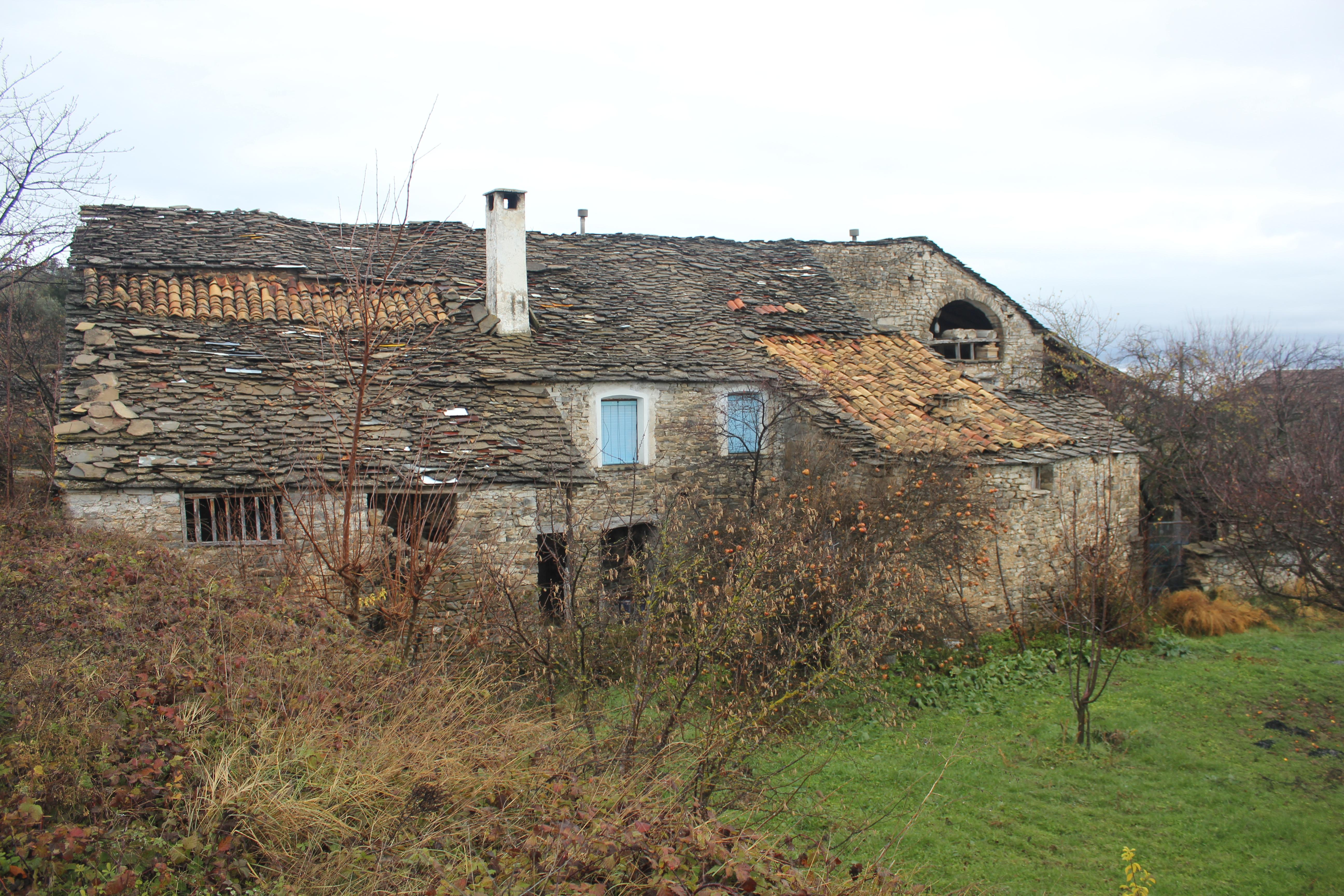 Aragonés: Una casa en Mondot.